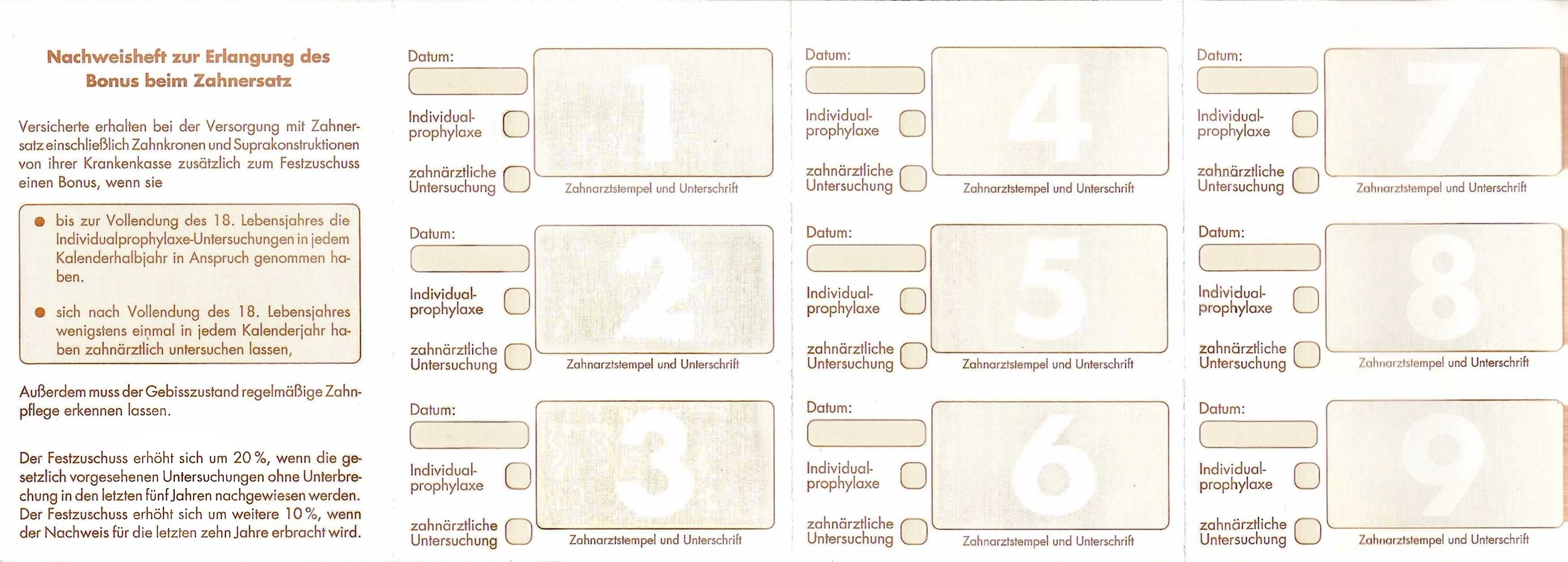 Bonusheft, Zahnersatz, Zahnarzt, Krankenkasse